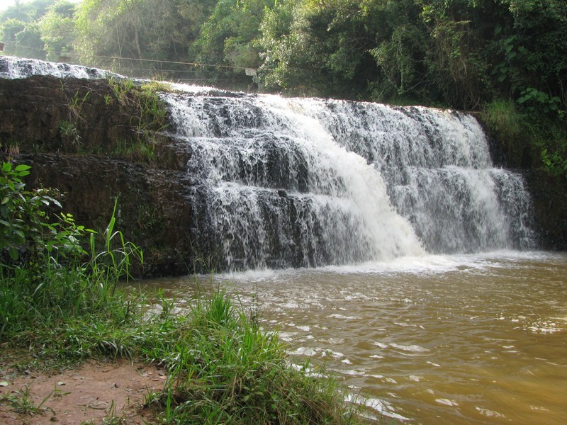 Cachoeira do escorregador